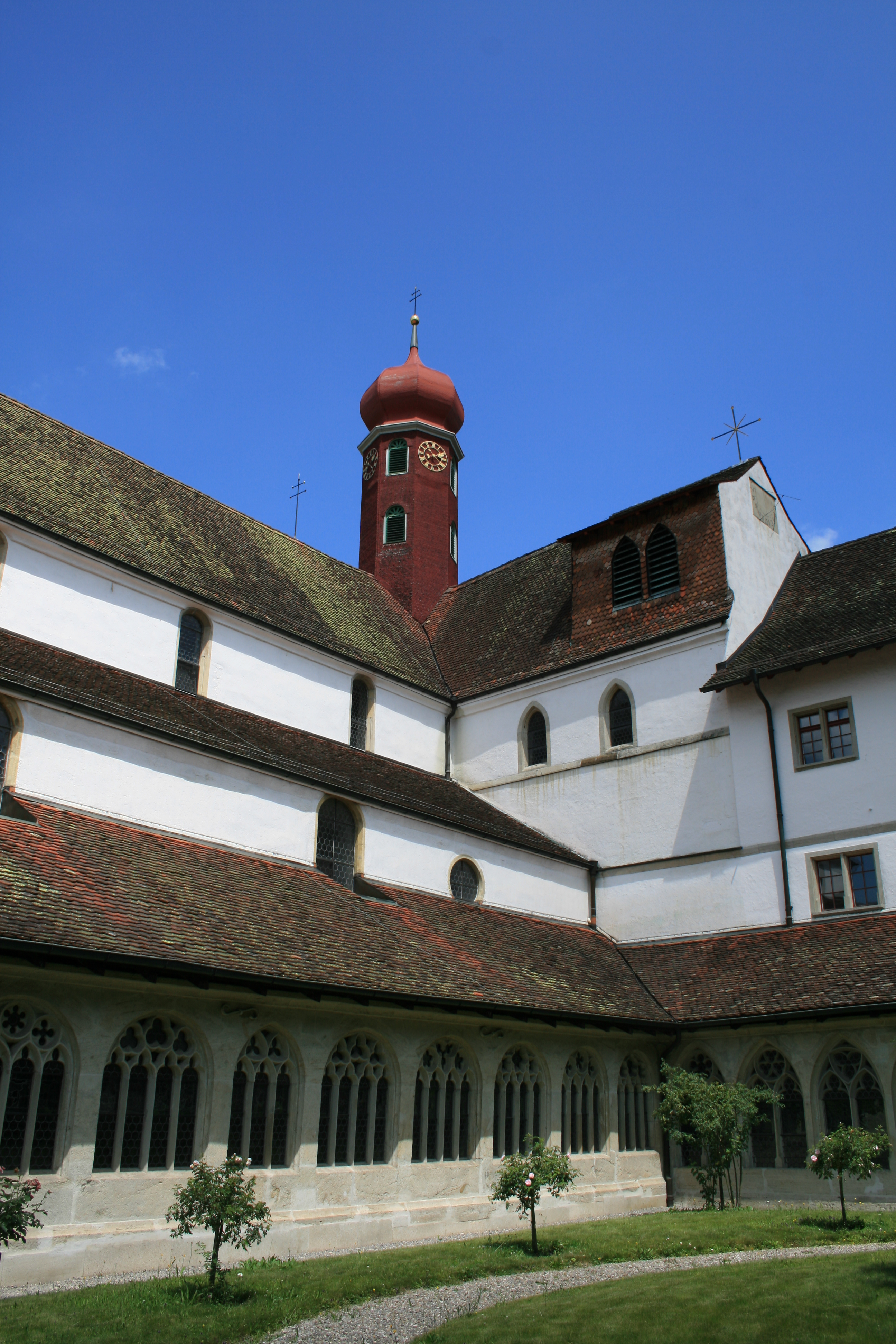 Klosterkirche und Kreuzgang Wettingen